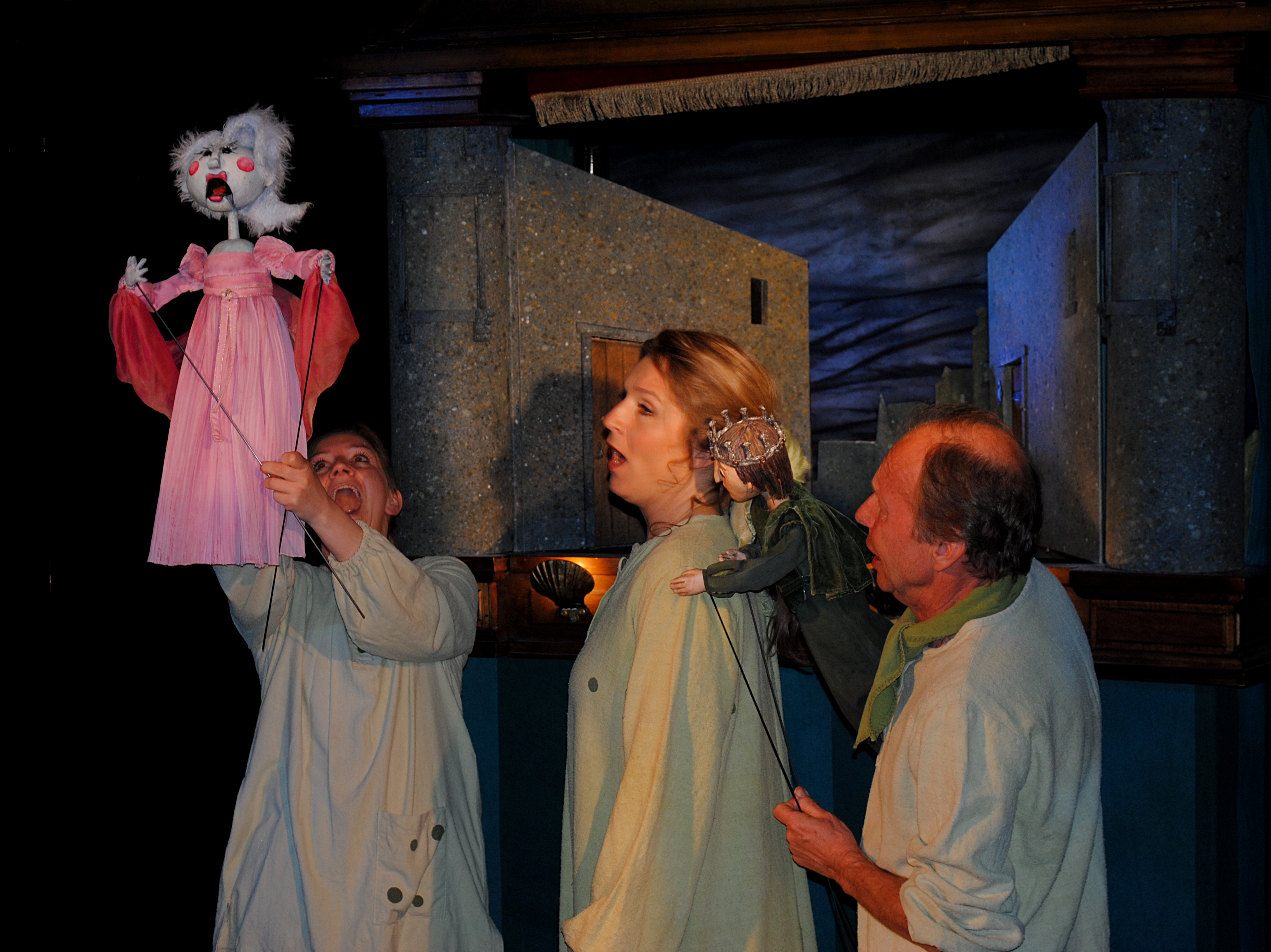 Agder teaters forestilling "Prinsessen på erten" i Den kulturelle skolesekken 2013.